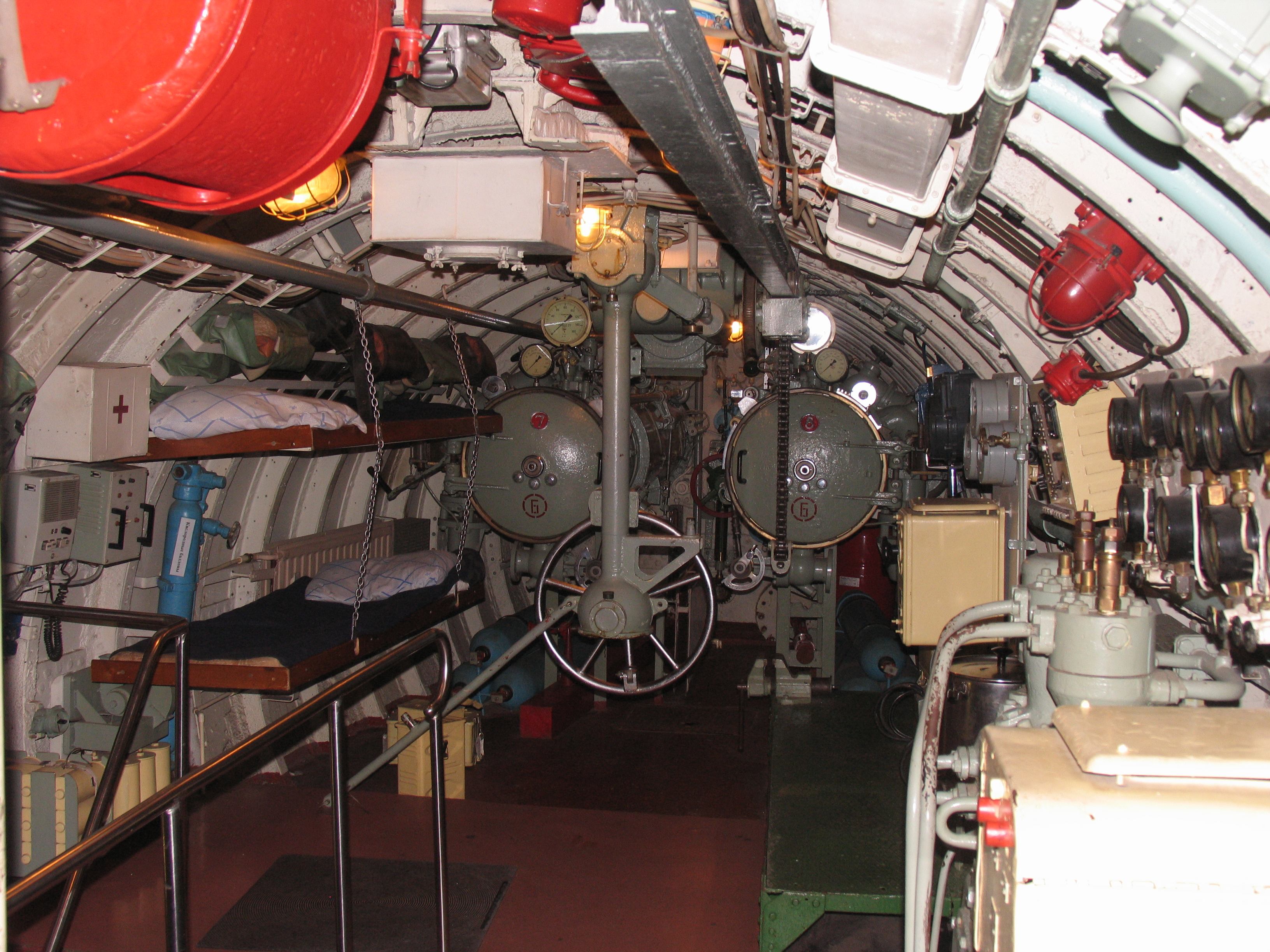 Подводная лодка Д-2 «Народоволец». Седьмой (кормовой торпедный) отсек. Вид в сторону кормы.